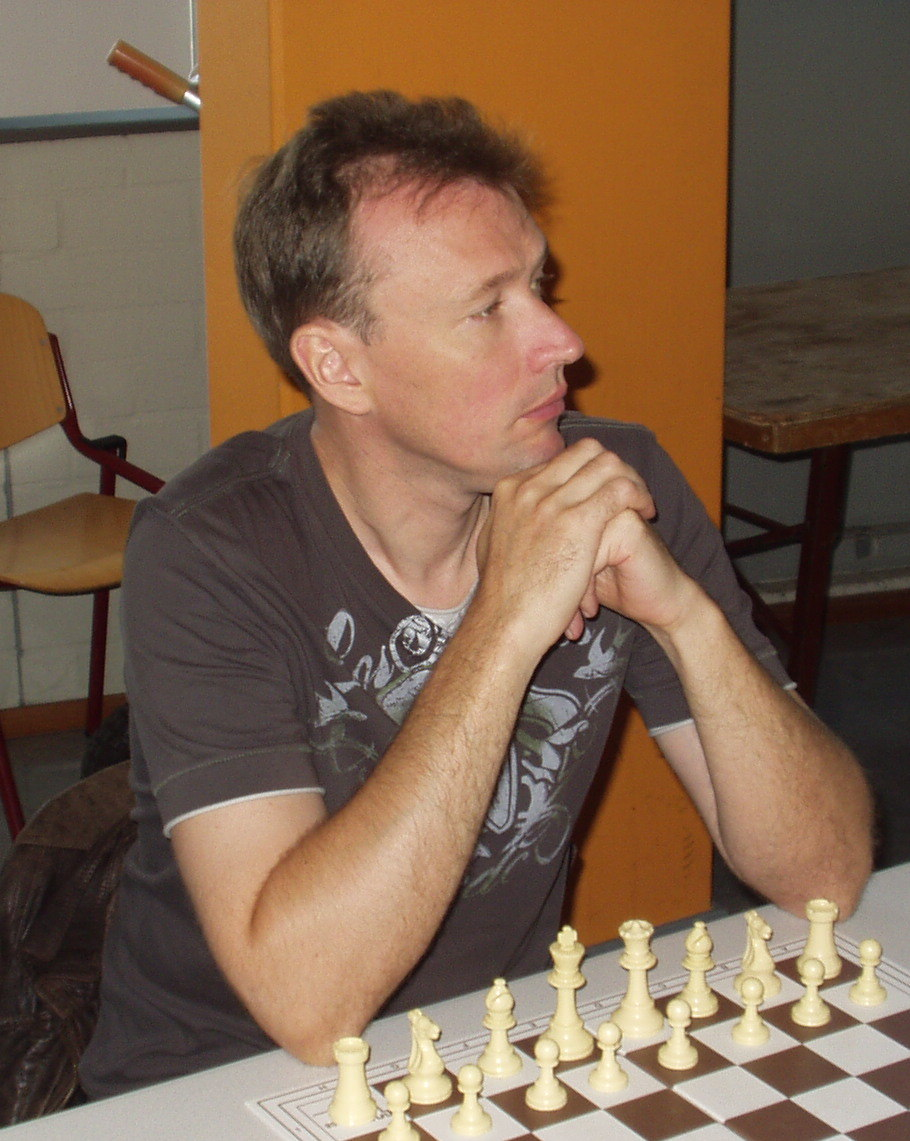 GM Viesturs Meijers, Gouda 2007